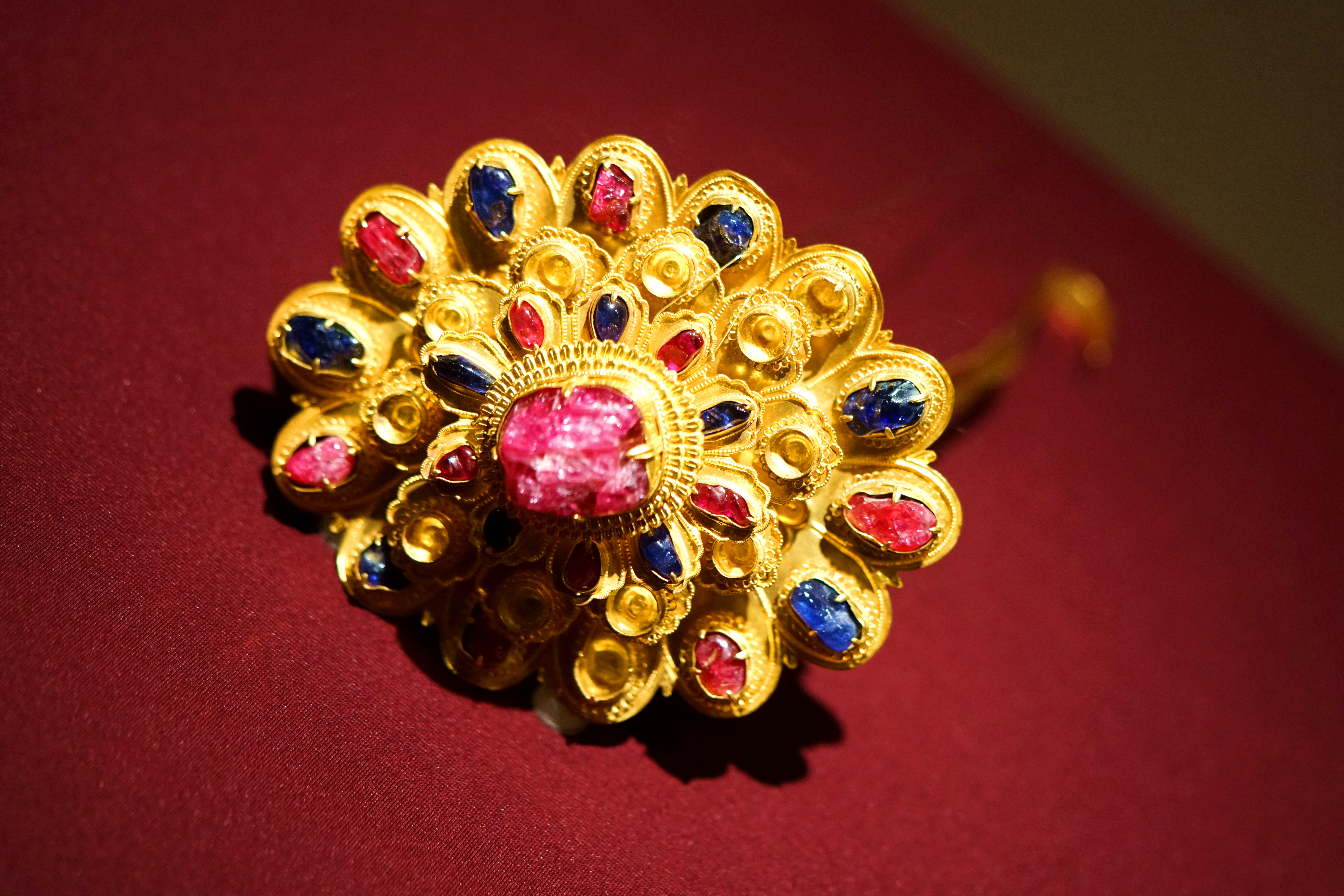 中文（中国大陆）: 嵌宝石金头面 共六件 明代 南京江宁将军山沐斌夫人梅氏墓出土